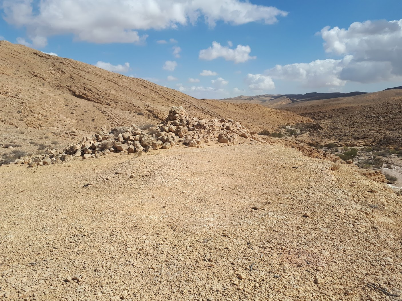 מצד גרפון מבט מזרחה לכוון נחל גרפון והמפגש עם נחל חווה